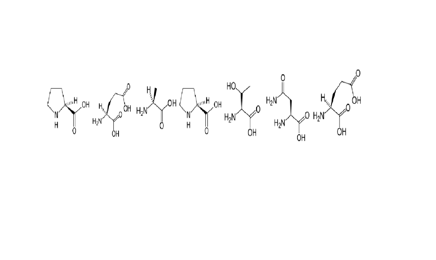 7aasequence